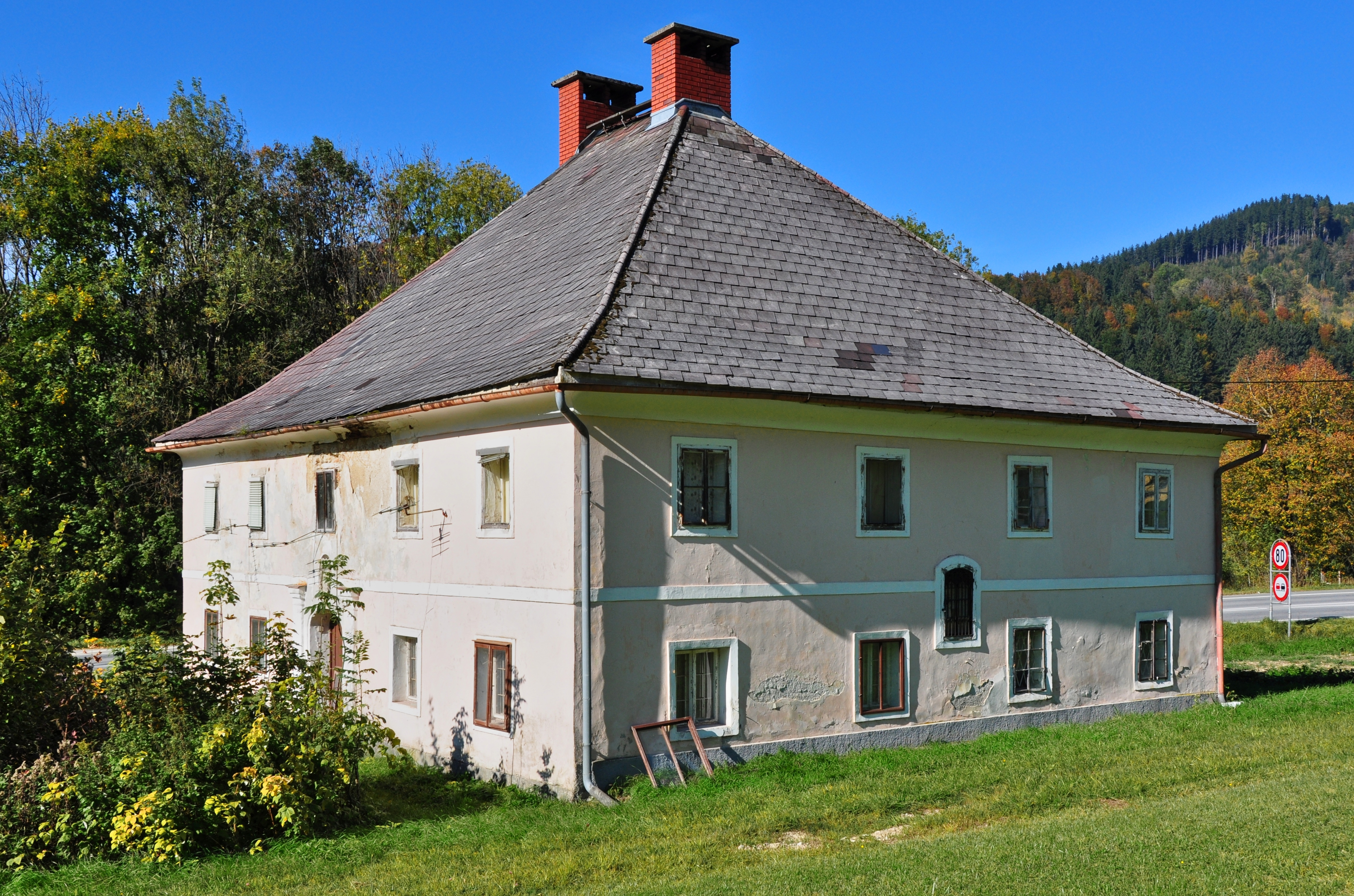 Ehem. Jagdschloß im Ortsteil Guggenthal der Gemeinde Koppl. Seit 2005 unter Denkmalschutz.